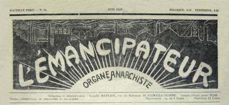 Journal anarchiste belge publié en 1921 par Camille Mattart puis journal de la "Fédération Communiste Libertaire" jusqu'en 1925.